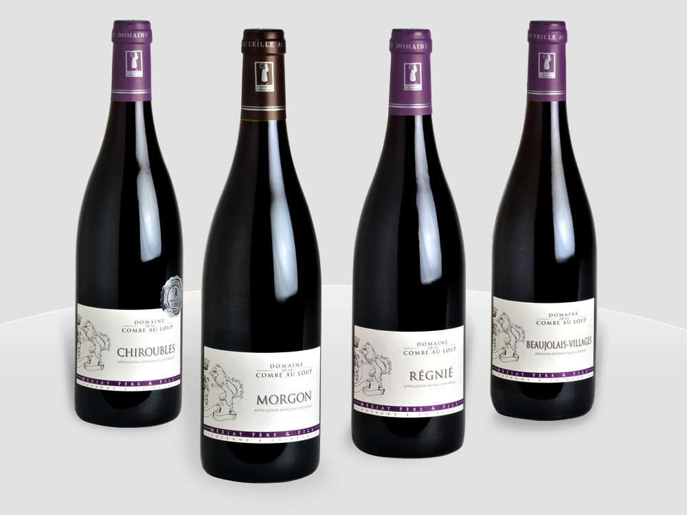 Un assortiment de bouteilles du Domaine de la Combe au Loup situé dans le Beaujolais (Morgon, Régnié, Chiroubles et Beaujolais-Villages)